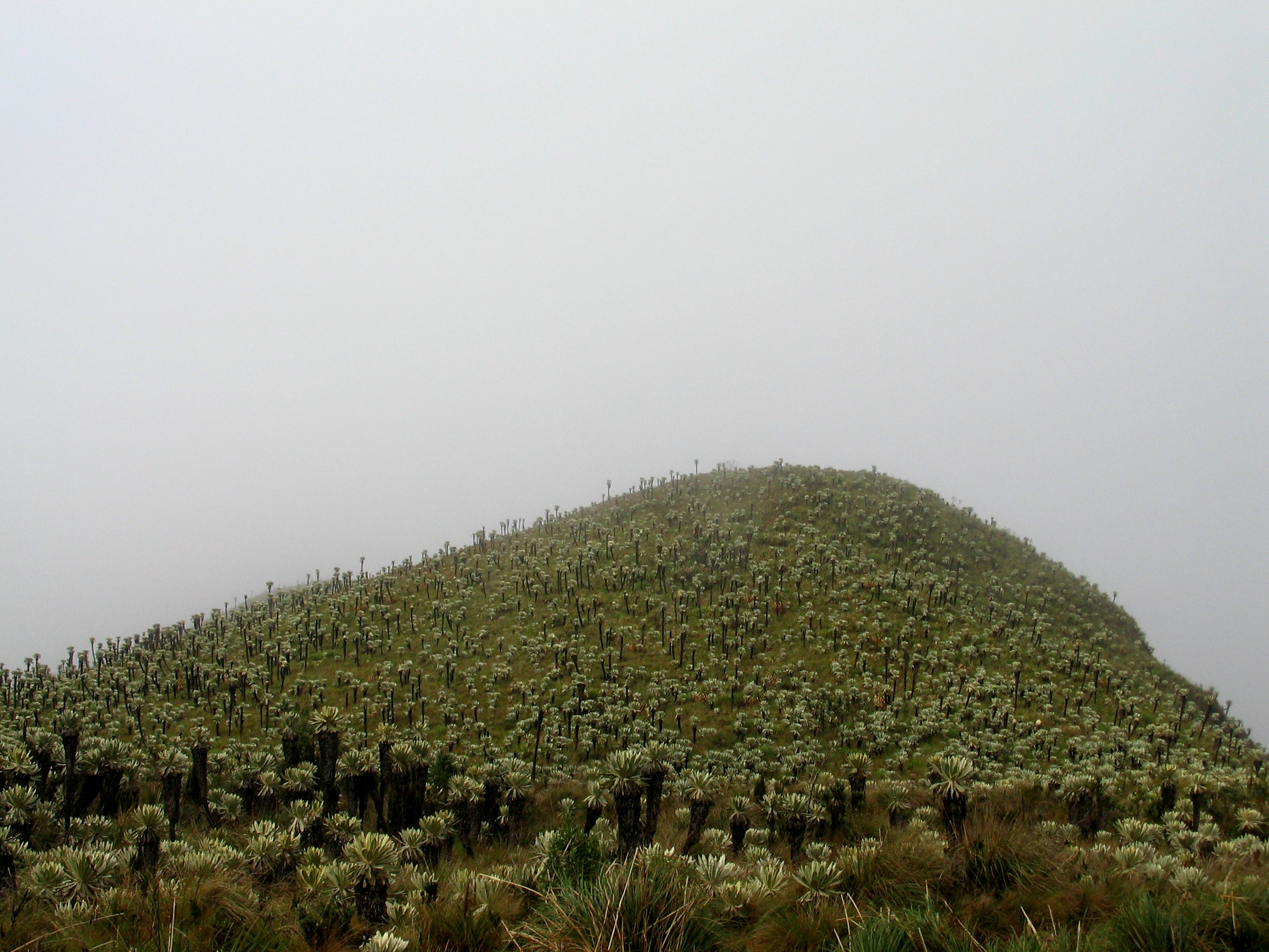 Espeletia pycnophylla, El Angel, Ecuador. (Identified as Espeletia curialensis on English Wikipedia page Espeletia)